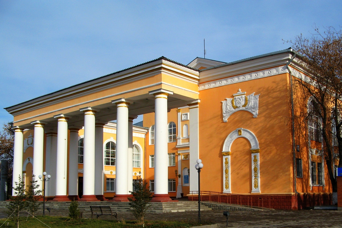 Театр юного зрителя